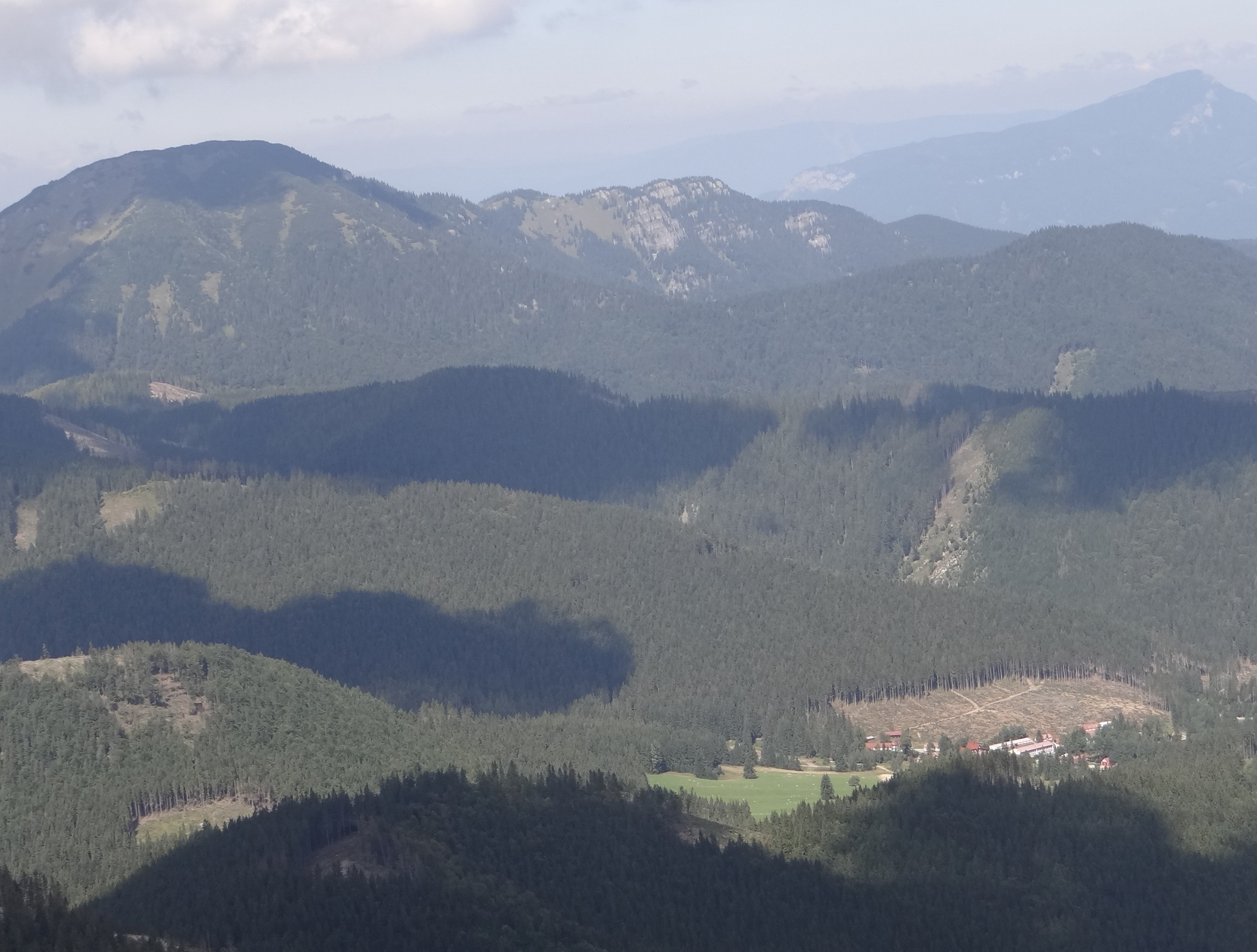 Widok z grani głównej Niżnych Tatr na Salatíny i osadę Železné